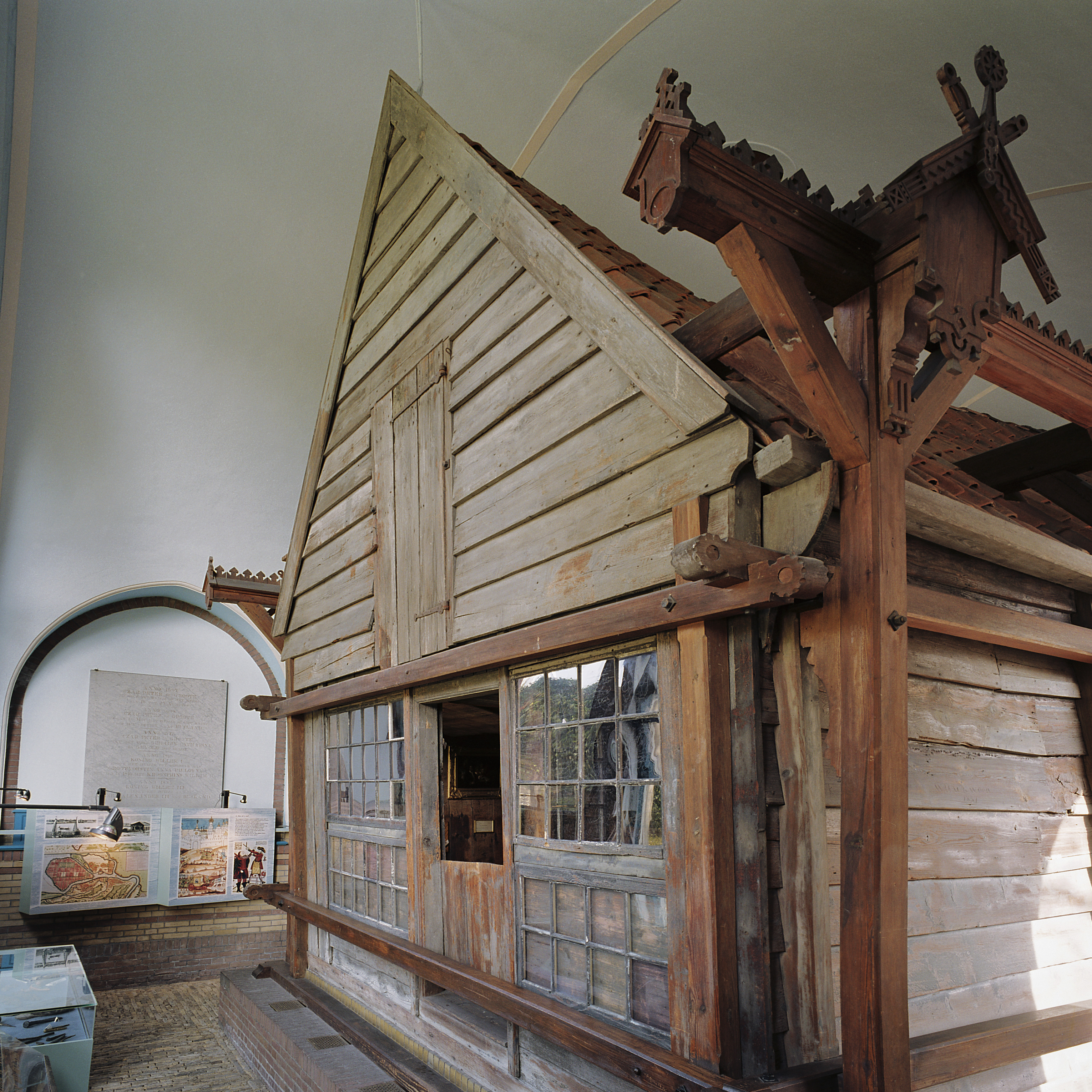 Czaar Peterhuisje - Museum: Interieur, buitenkant van het houten huis binnen het stenen huis